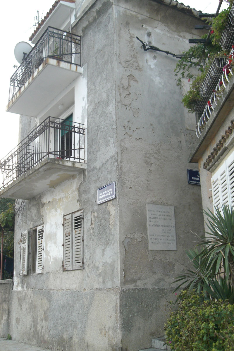 Volosko, Croatia - birthplace of Andrija Mohorovičić.